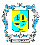 Герб Скадовська